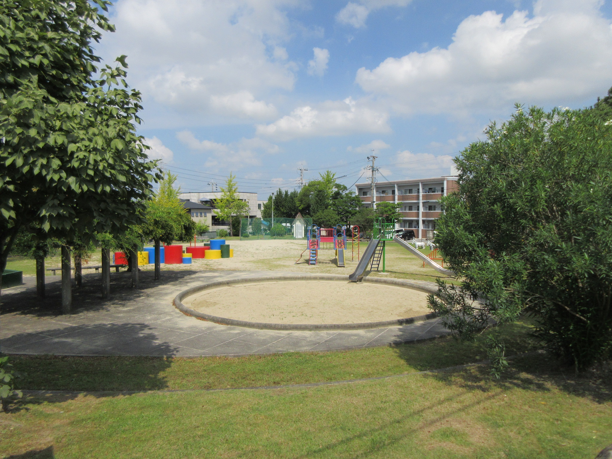 鴨田公園（岡崎市鴨田本町）